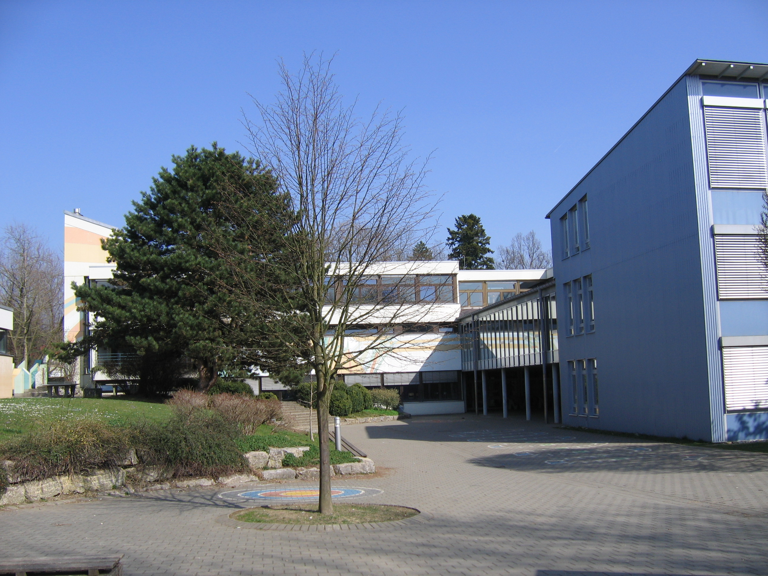 Deutschland - Baden-Württemberg - Bodenseekreis - Kressbronn am Bodensee: Parkschule